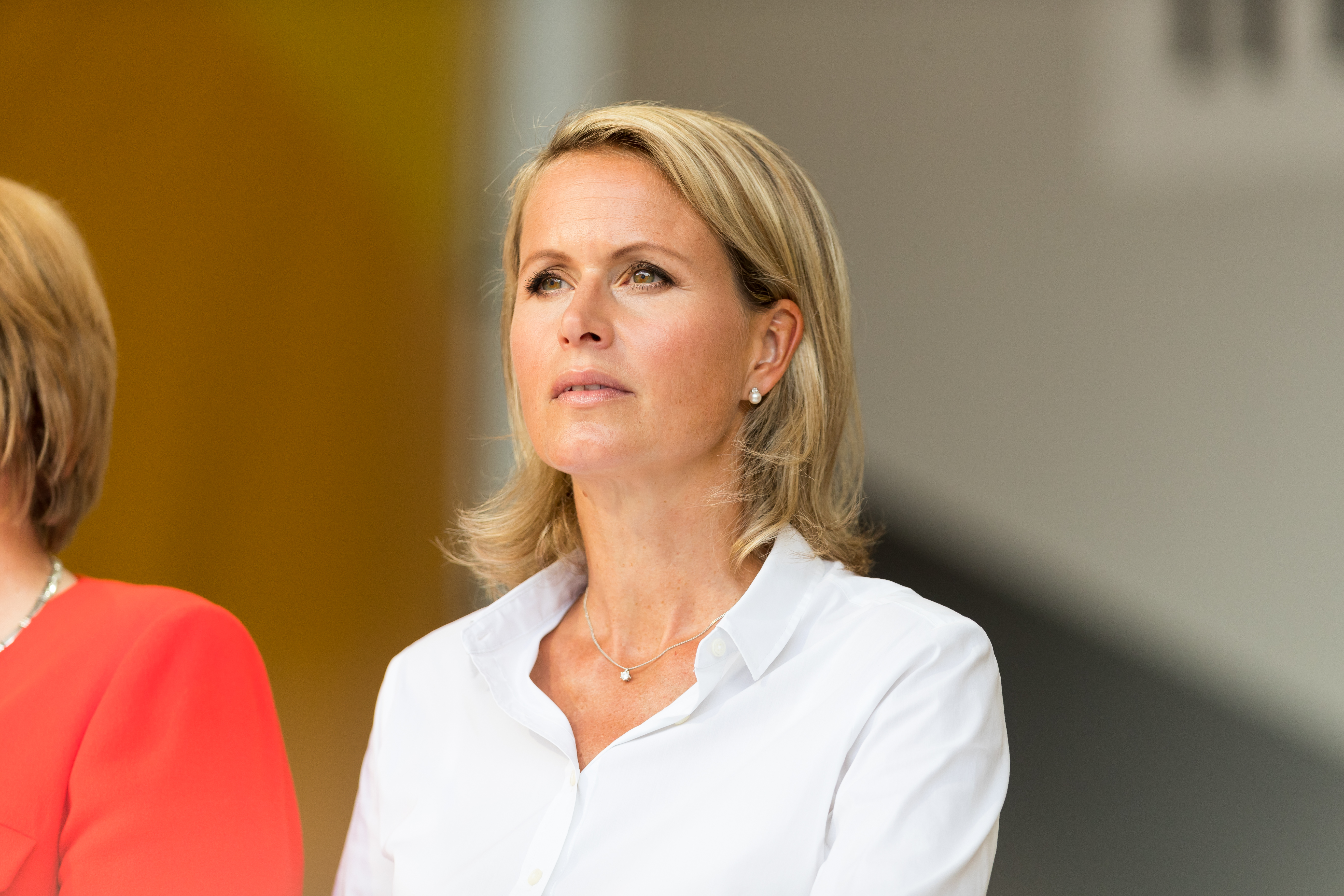 Angela Merkel during CDU Wahlkampf Heidelberg at Universitätsplatz Heidelberg, Heidelberg, Baden-Württemberg, Germany on 2017-09-05, Photo: Sven Mandel Claudia von Brauchitsch Karl Alfred Lamers Thomas Strobl